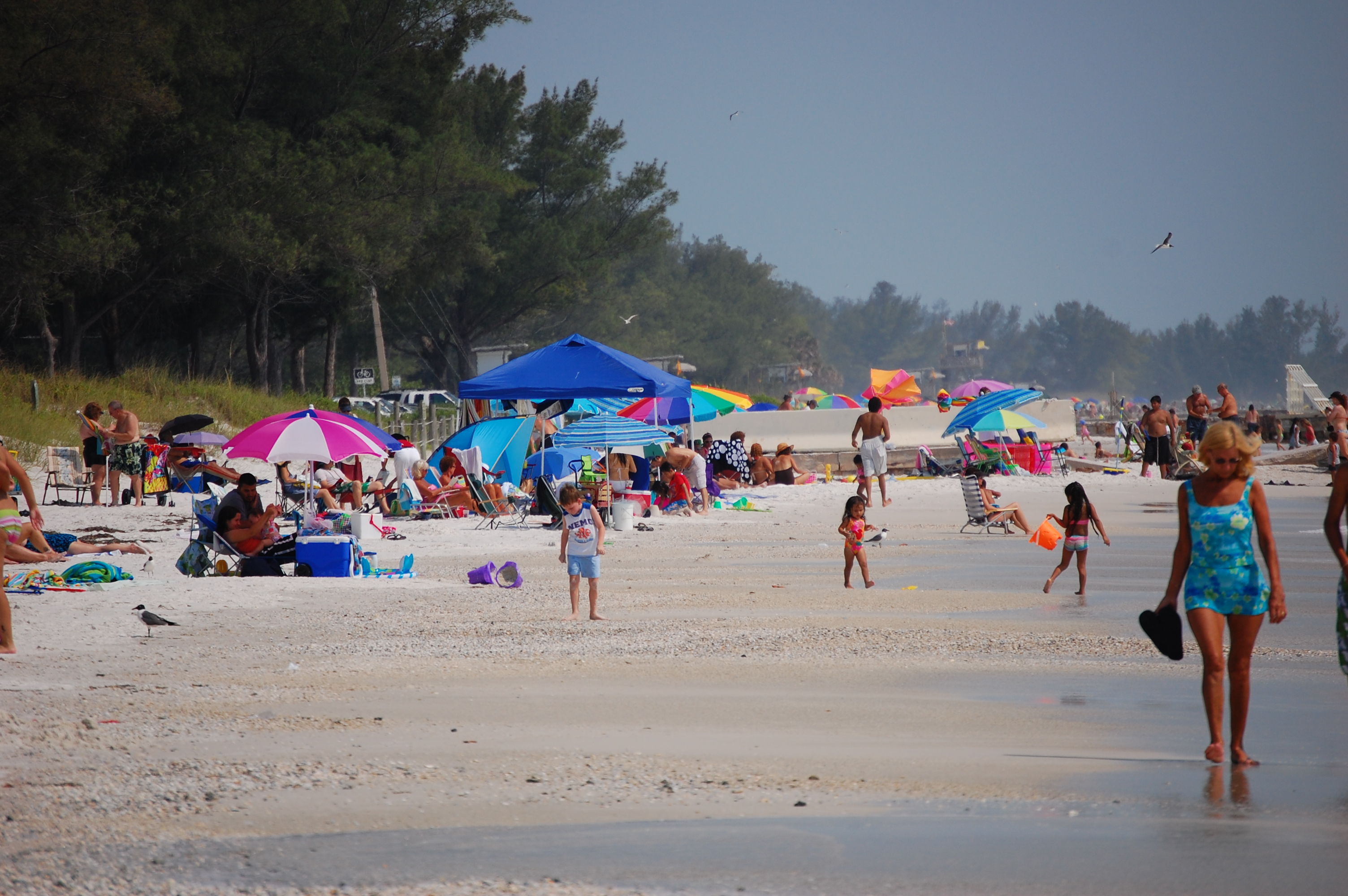 Bradenton Beach, Florida.